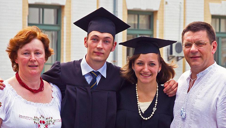 Родна Сергія Одарича